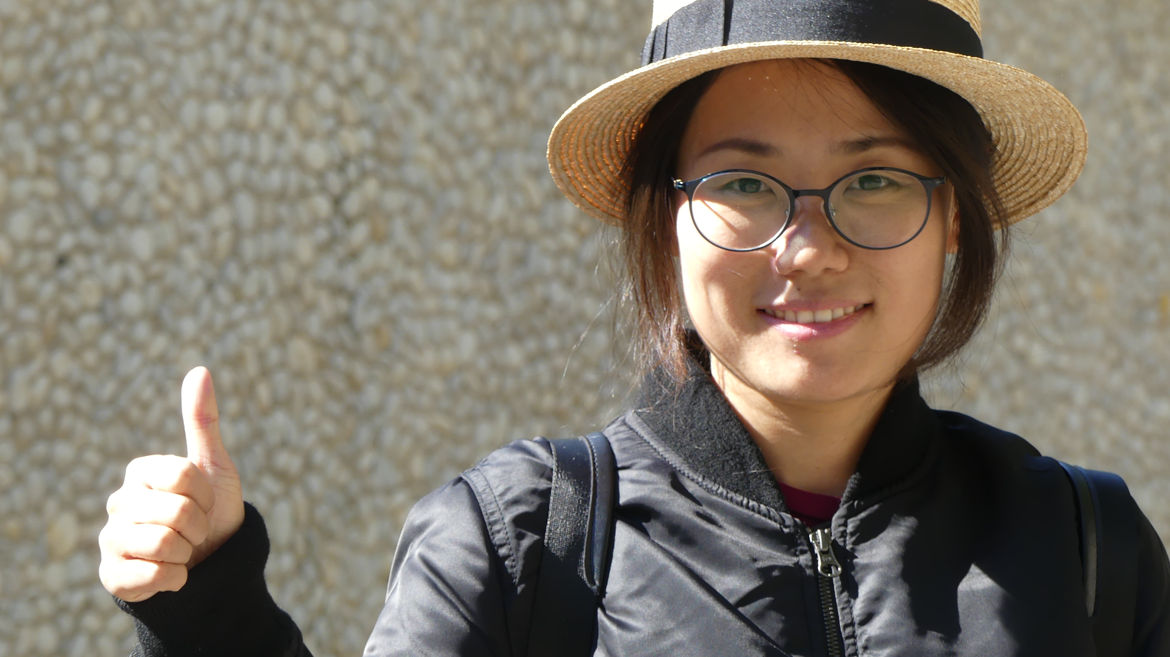 Guojing on September 7, 2016 on the forecourt of Haus der Berliner Festspiele during her participation at the section International Children´s and Young Adult Literature of the 16th international literature festival belrin